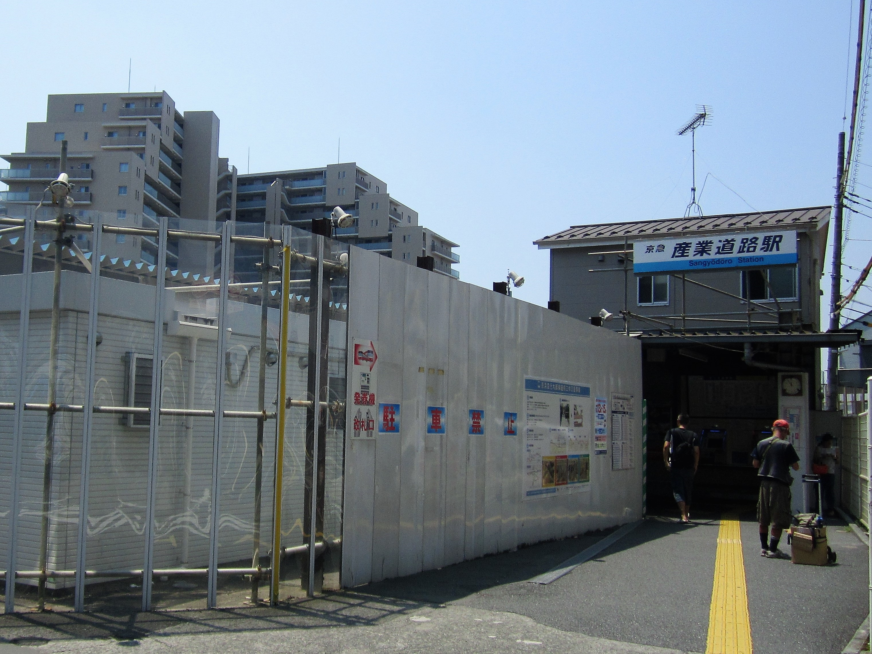 産業道路駅（2019年8月）